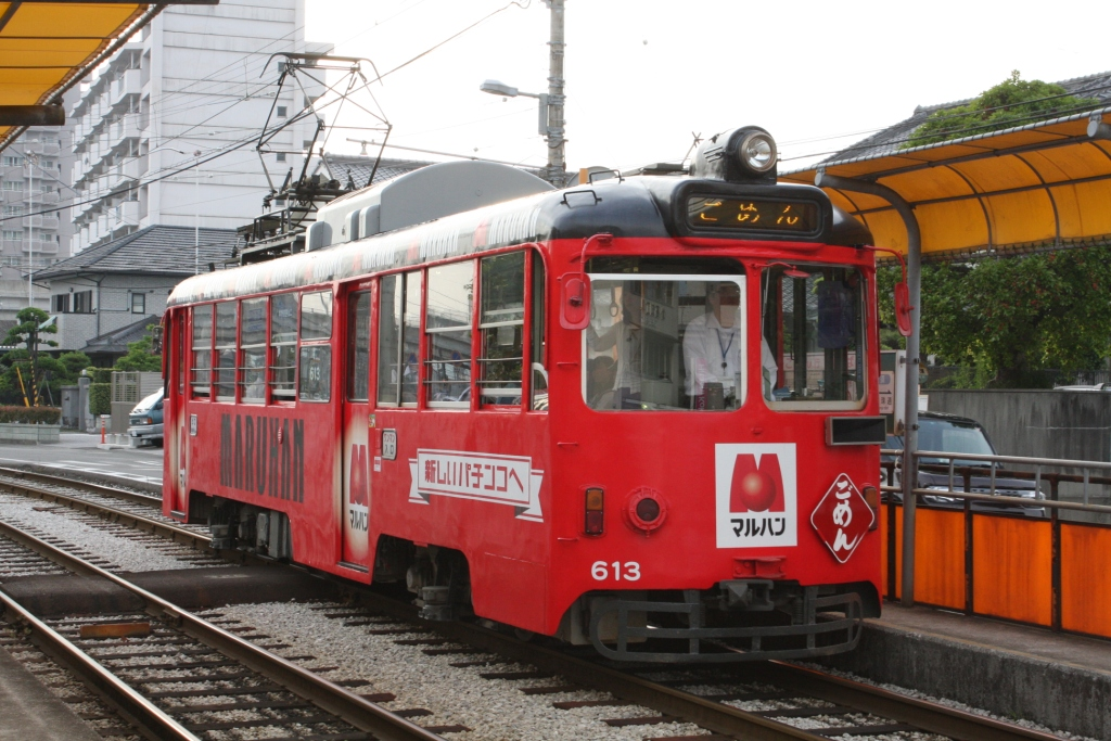 土佐電気鉄道後免線高須駅